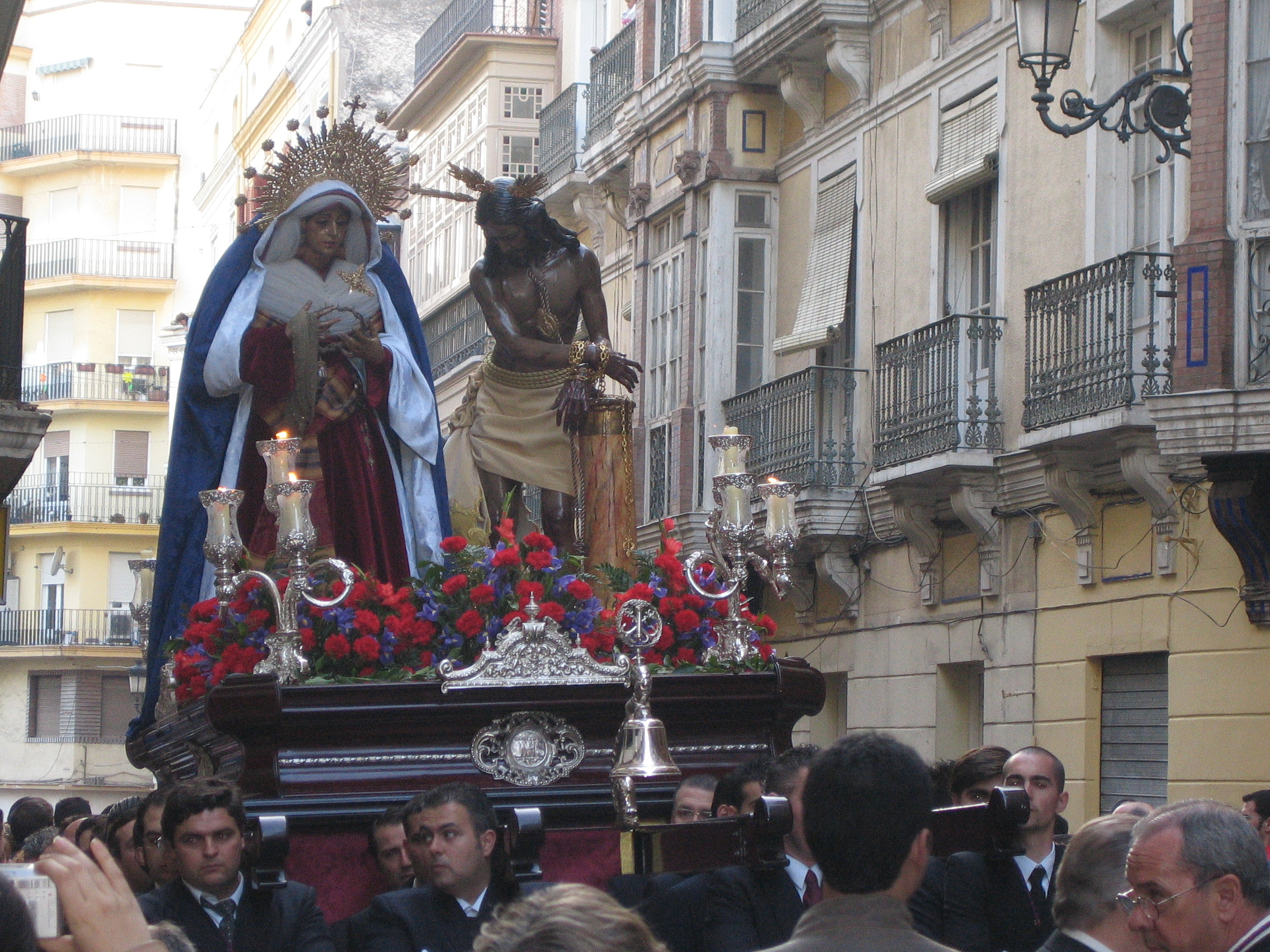 Traslado de la cofradia de los Gitanos en Málaga